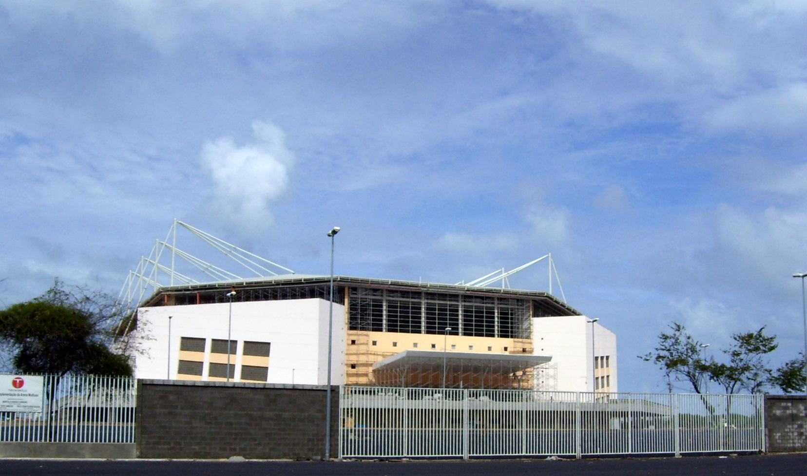 Jogos Panamericanos Rio 2007 - Complexo Esportivo do Autódromo: Arena Olímpica (basquete e ginástica artística)